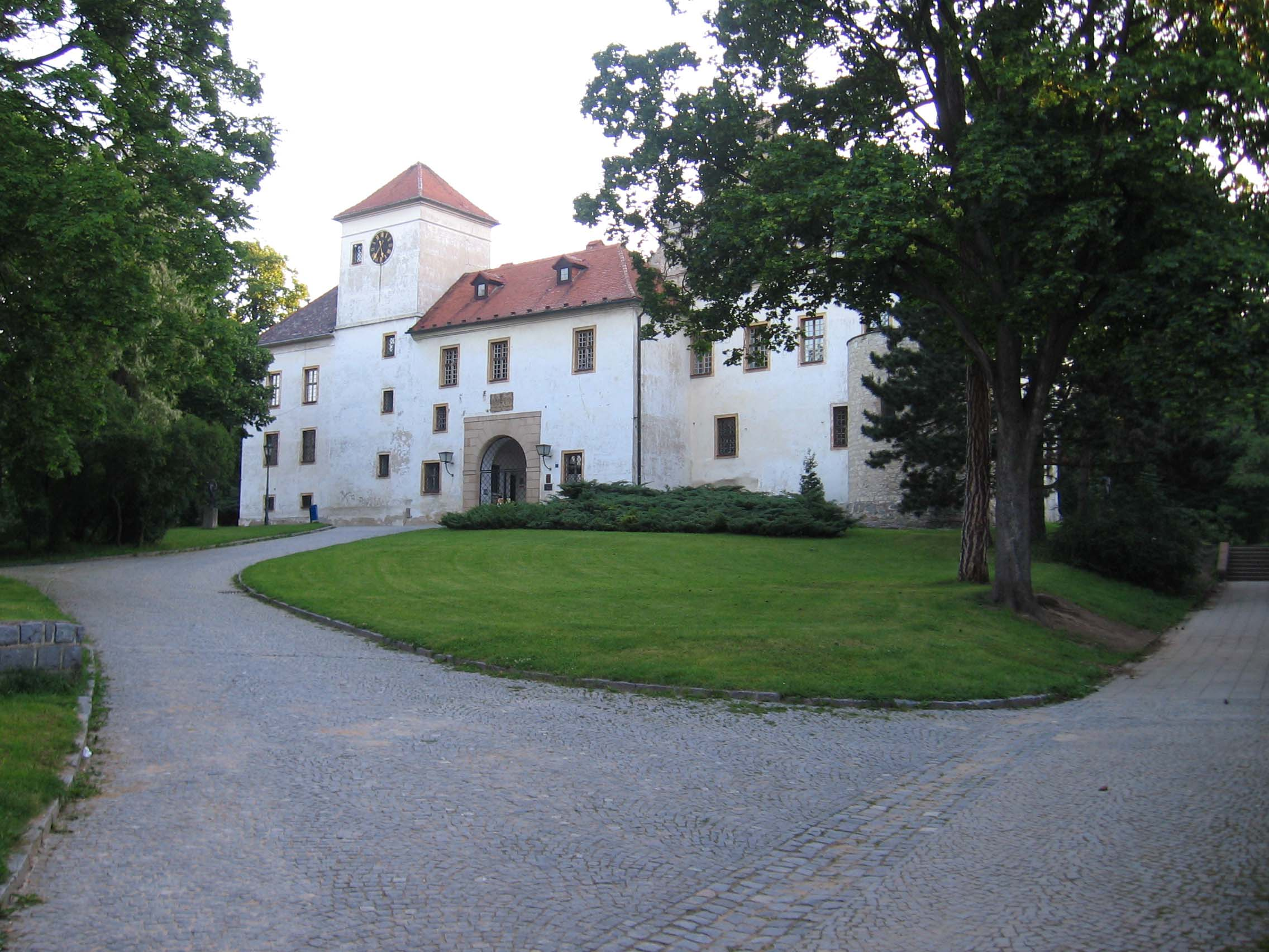 Zámek v Blansku, dnes sídlo muzea.